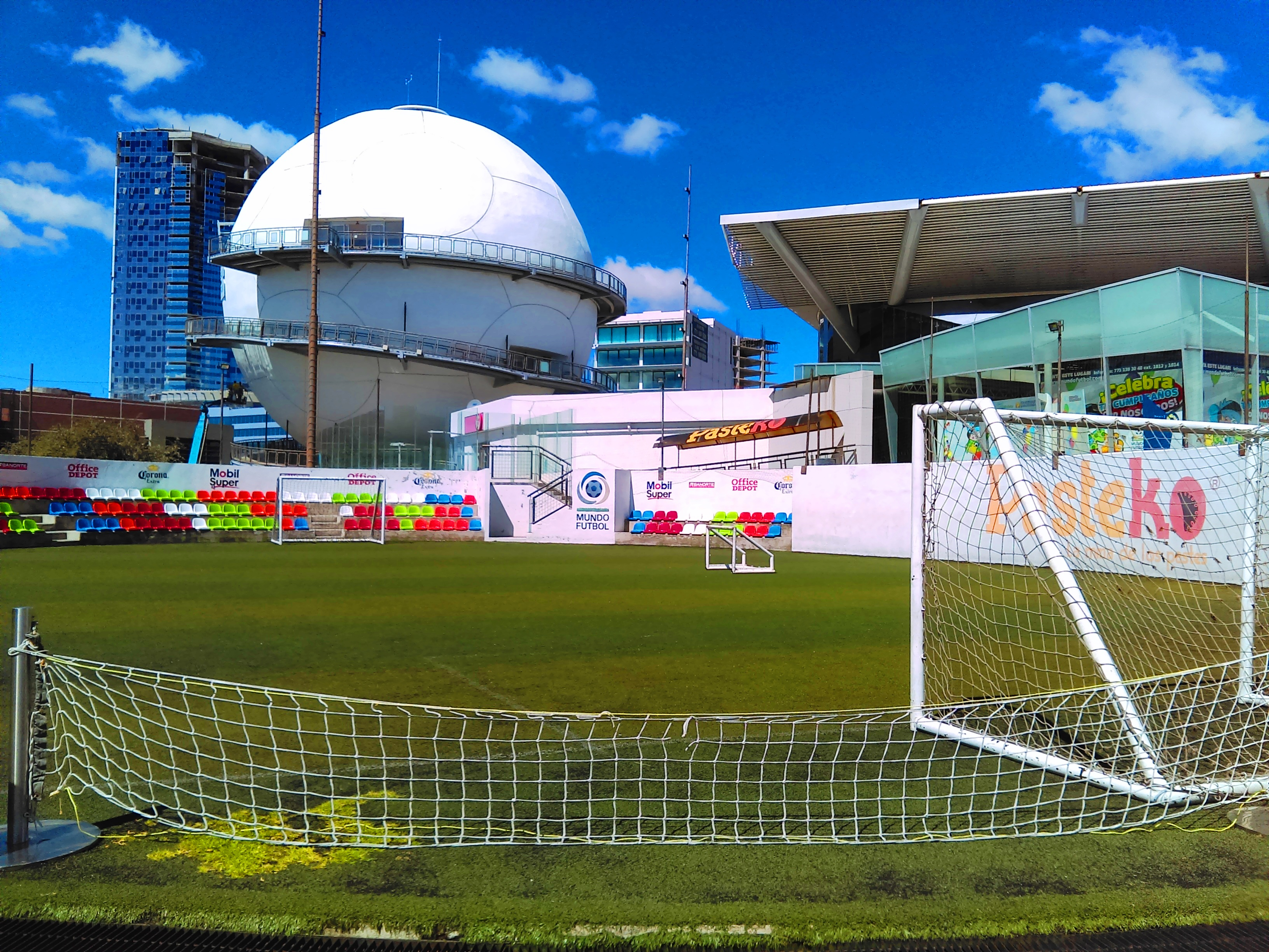 Centro Interactivo Mundo Futbol.